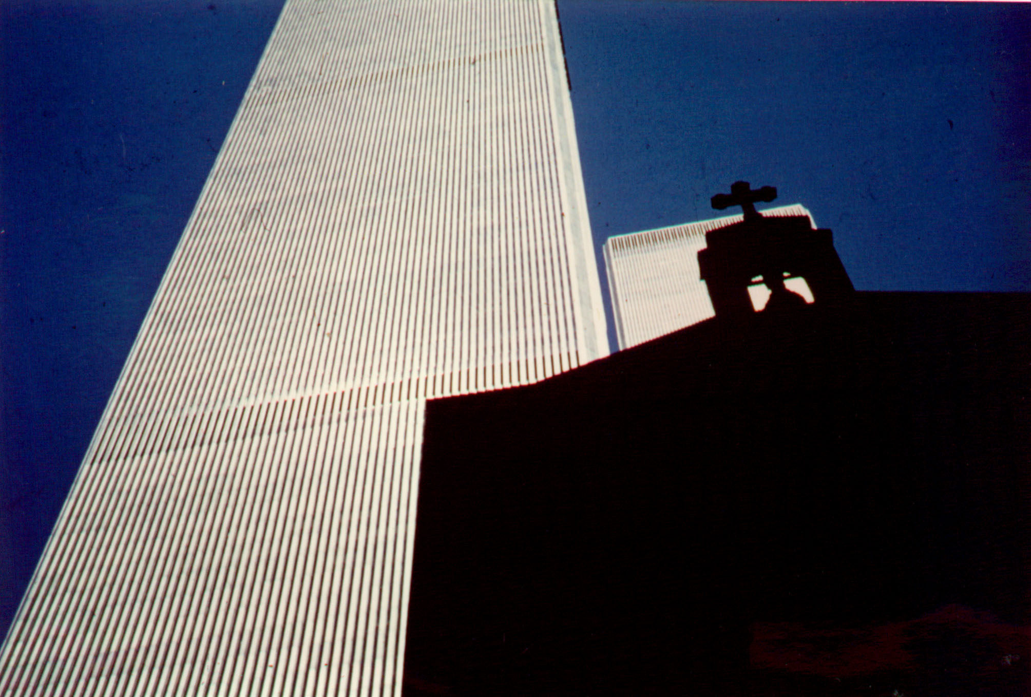 World Trade Center mit griechischer Kapelle im Vordergrund 1974